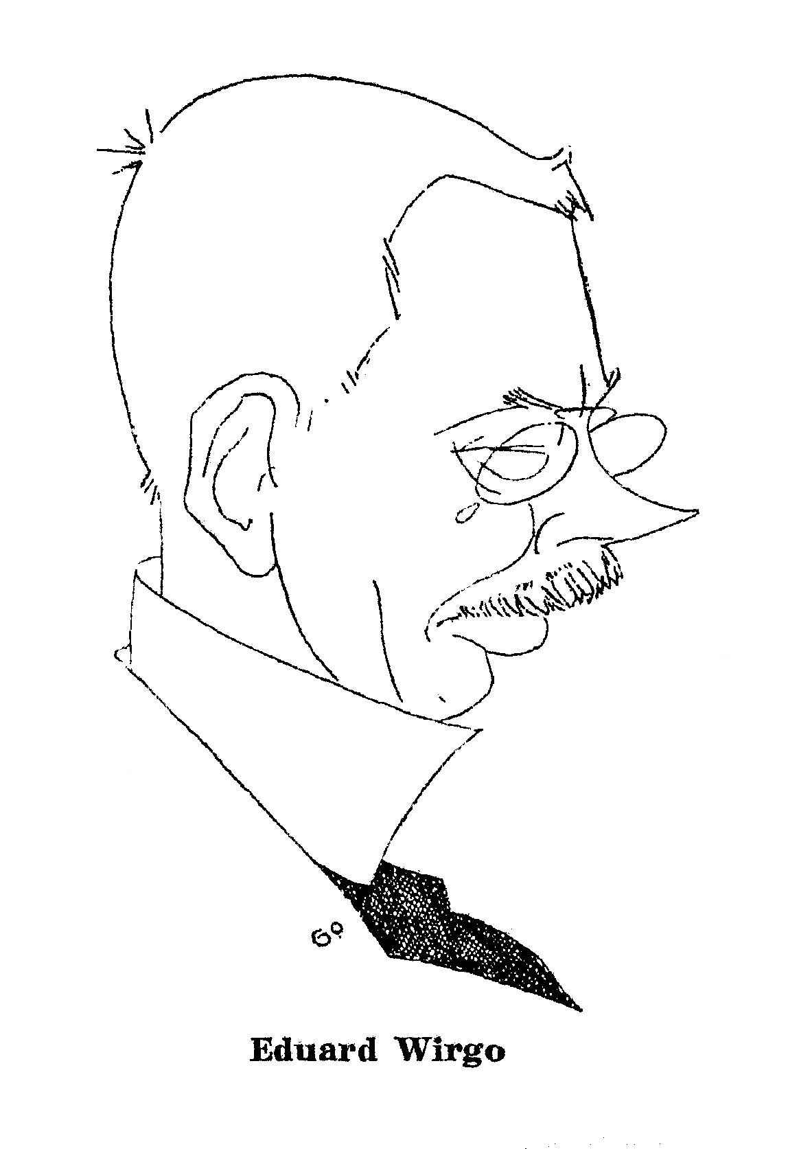 Gori šarž Eduard Virgost